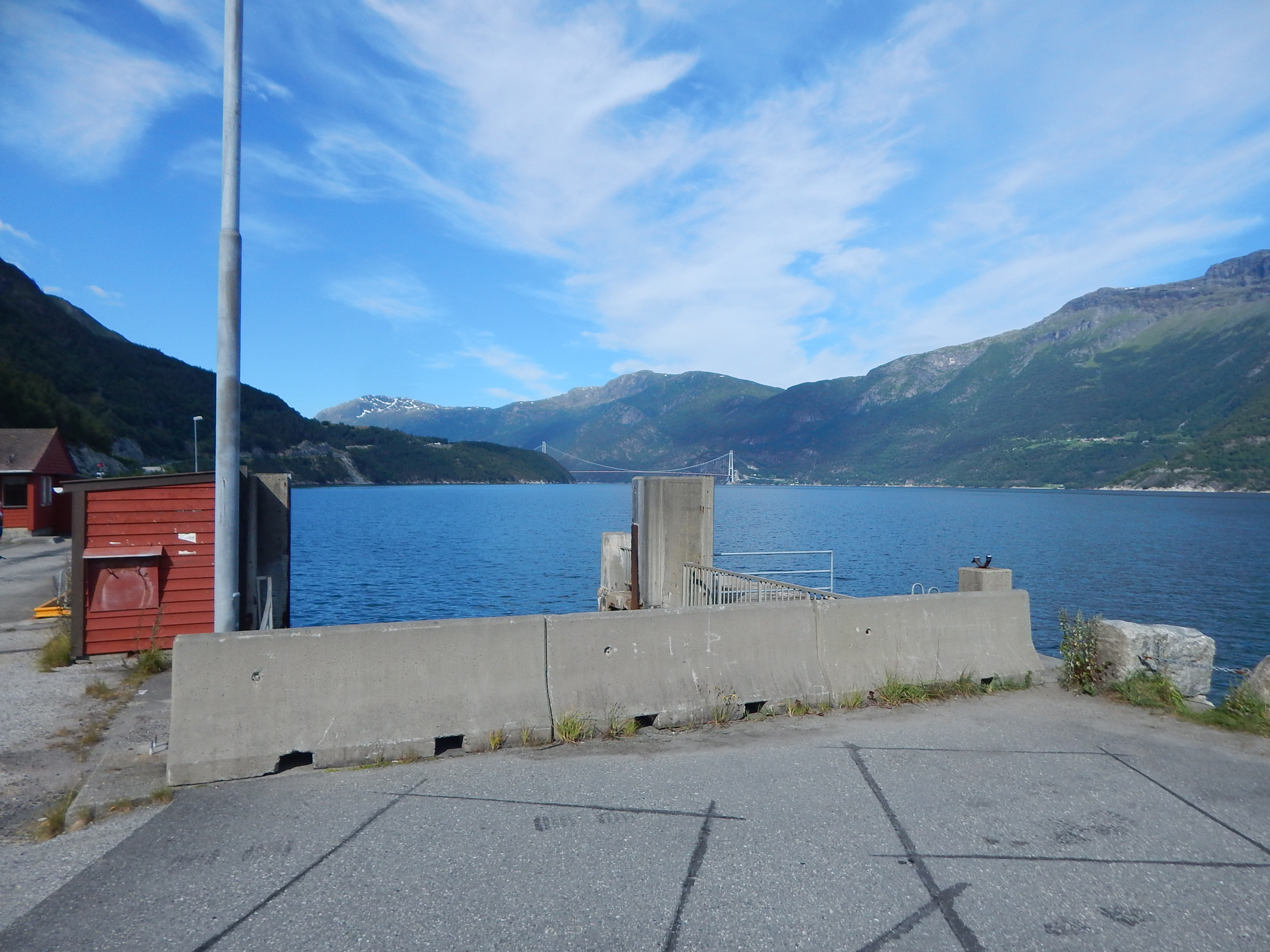 Brimnes fergekai nedlagt etter åpningen av Hardangerbrua